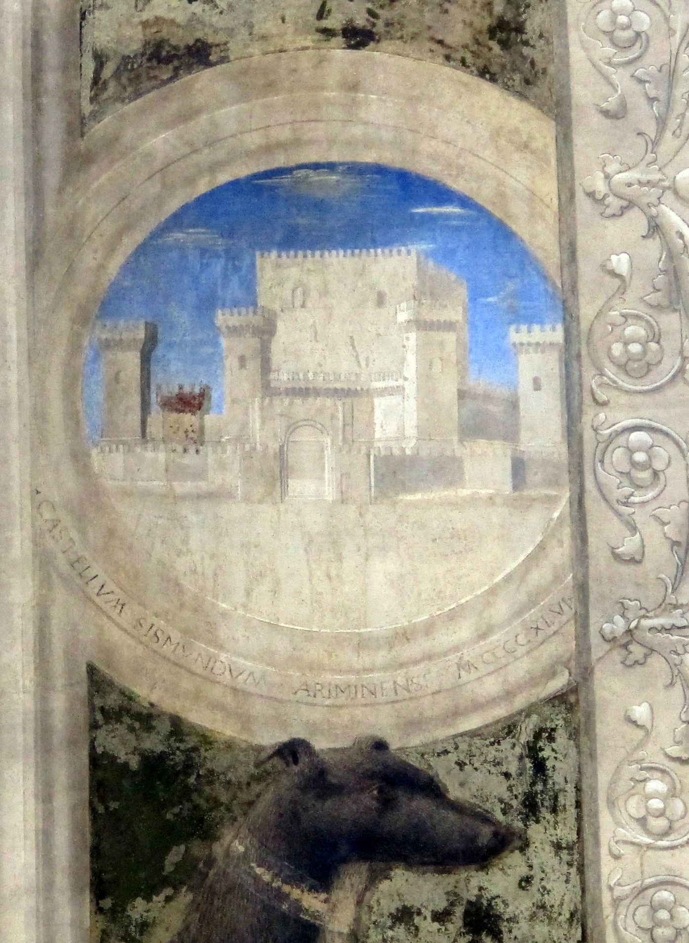 Tempio Malatestiano - MIBAC This is a photo of a monument which is part of cultural heritage of Italy.